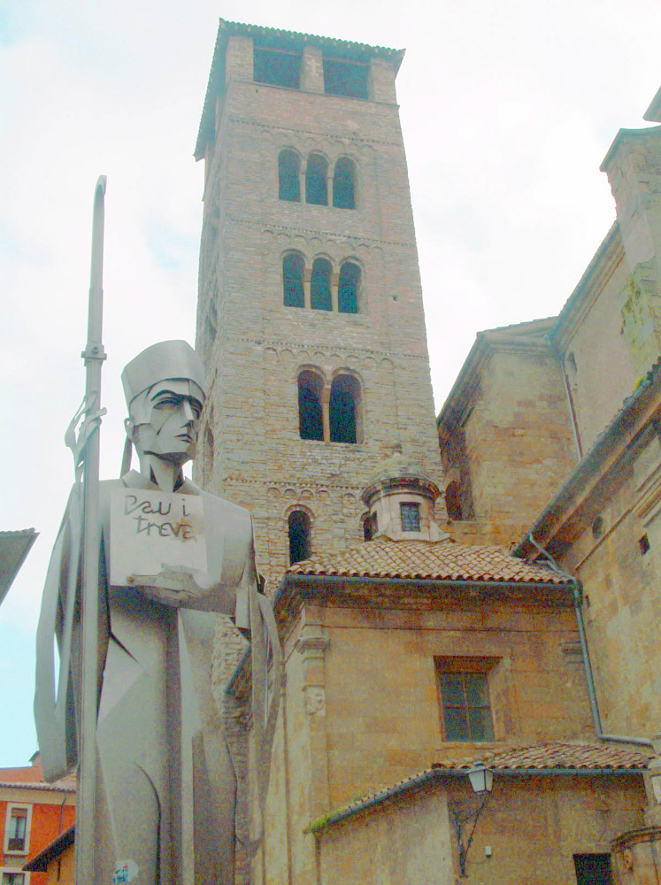 Campanar, catedral i estàtua abat Oliva. Vic, Osona